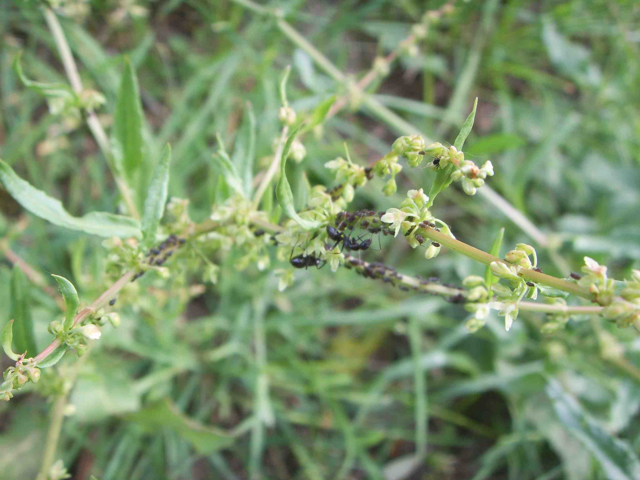 Formiche in simbiosi con afidi. Foto scattata da me (Pepp.cristiano 16:08, 20 mag 2006 (CEST), Giuseppe Cristiano), la rilascio nel pubblico dominio